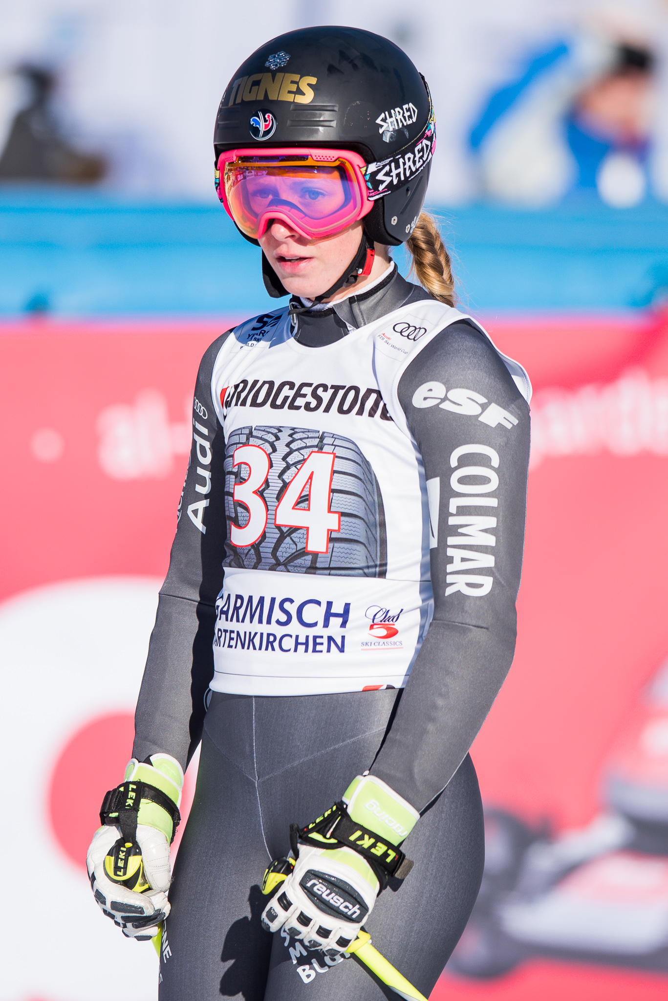 64. Kandahar Rennen,Audi FIS Ski Weltcup Garmisch-Partenkirchen,Damen Super-G,Kandahar,Ladies Super-G,Laura Gauche